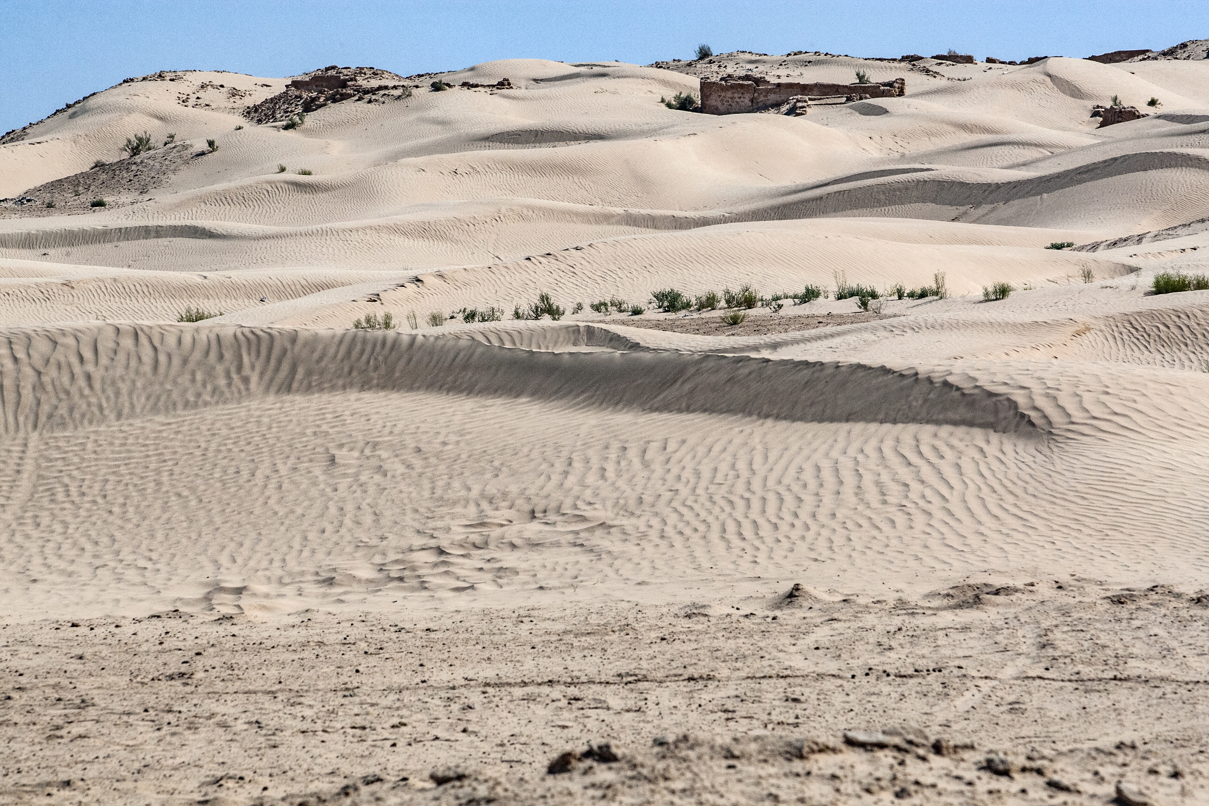 Okolice Douz. Wielki Erg Wschodni.